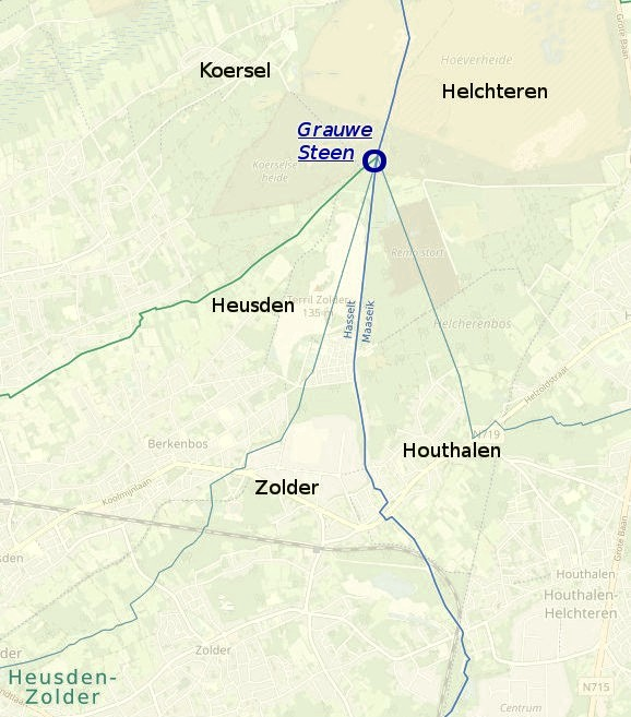 Grauwe Steen met de gemeentegrenzen van de vroegere vijf gemeenten waarvoor de zwerfsteen al eeuwen het gezamenlijk grenspunt is.